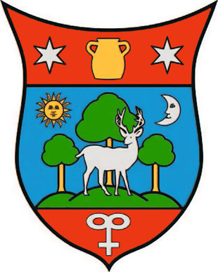 Coat of arms of Óbánya, Hungary. Details: Óbánya településképi arculati kézikönyve 2017